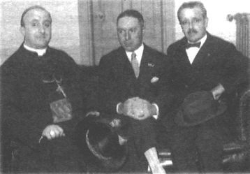 Fotografía de Juan Francisco Aragone (1883 – 1953), católico uruguayo, segundo Arzobispo de Montevideo (Uruguay).